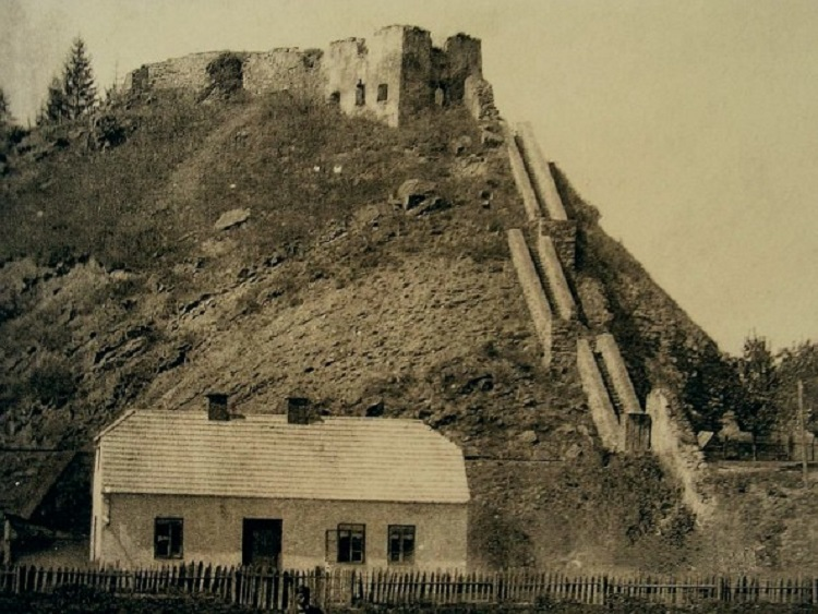 Magyar Királyi Államvasutak legkeletibb, 30. számú vasúti őrháza és a Rákóczi-vár romjai a történelmi Erdély és Moldva határán. A Rákóczi-várat a 17. század elején Bethlen Gábor erdélyi fejedelem építtette, majd a 18. század elején II. Rákóczi Ferenc fejedelem erősíttette meg.